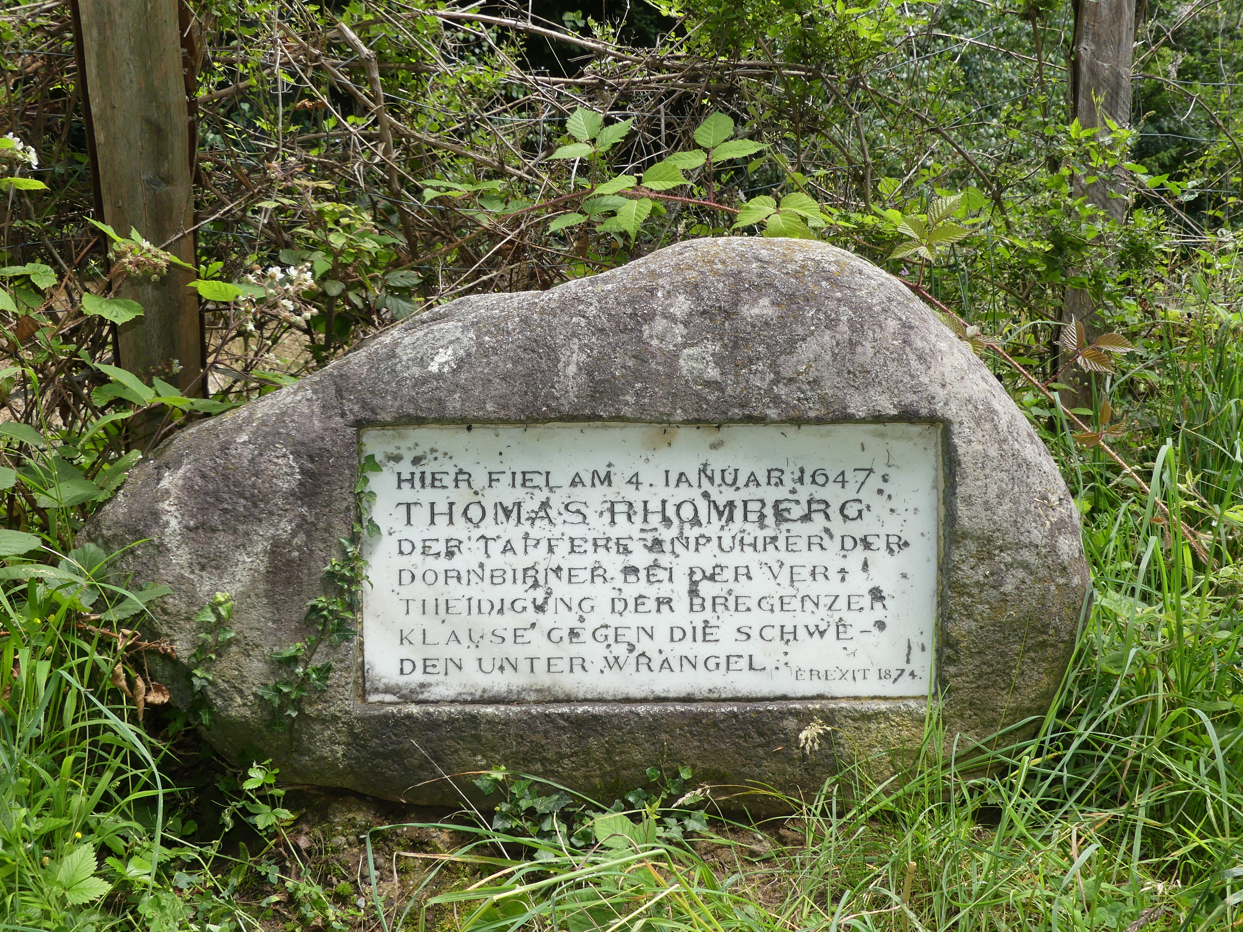 Der Rhombergstein ist ein Gedenkstein zu Ehren des Anführers der Dornbirner im Dreißigjährigen Krieg, Thomas Rhomberg.